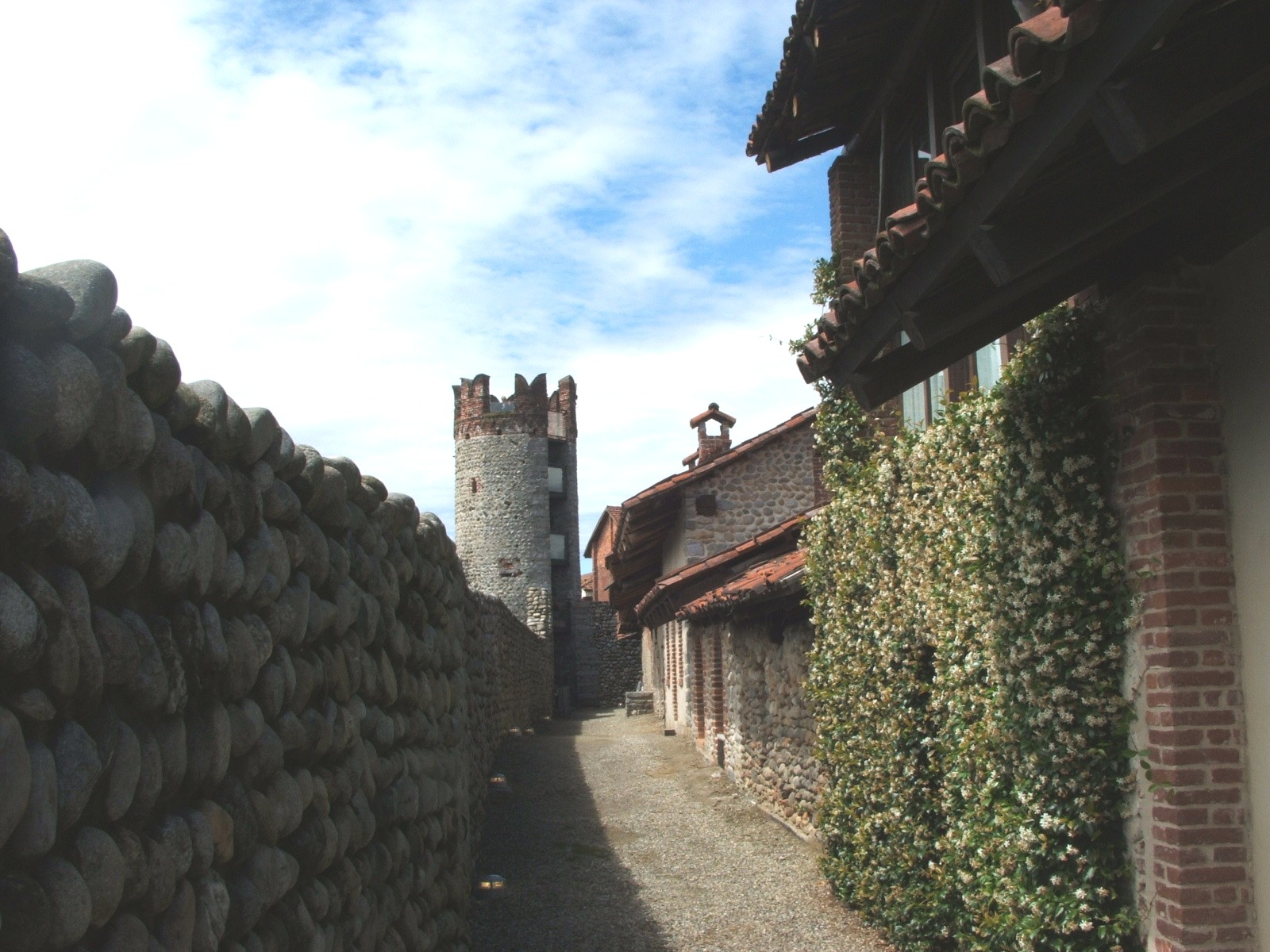 Ricetto di Candelo, provincia di Biella, Piemonte, Italia